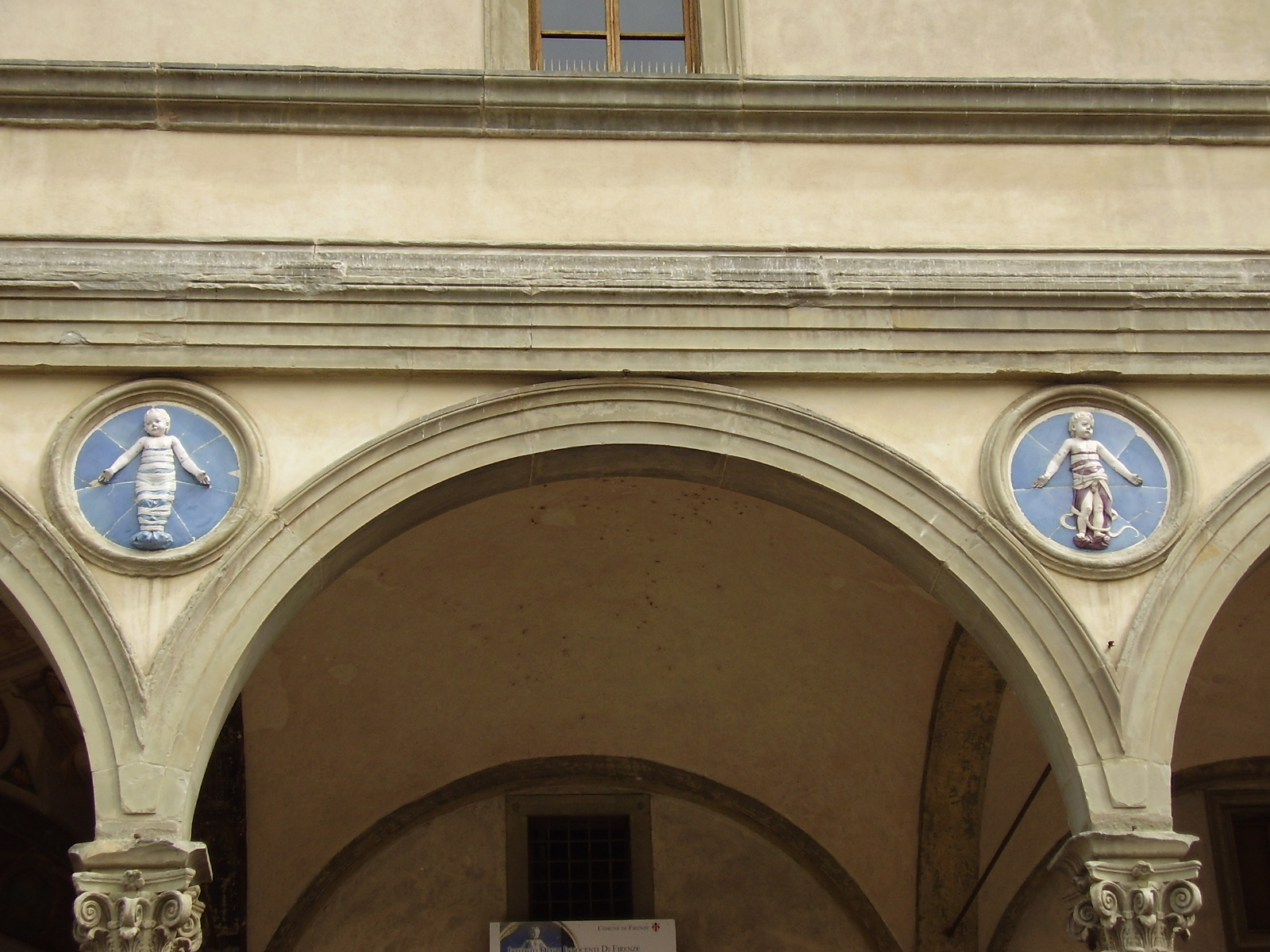 Spedale degli Innocenti detail, outside view in Florence, Italy